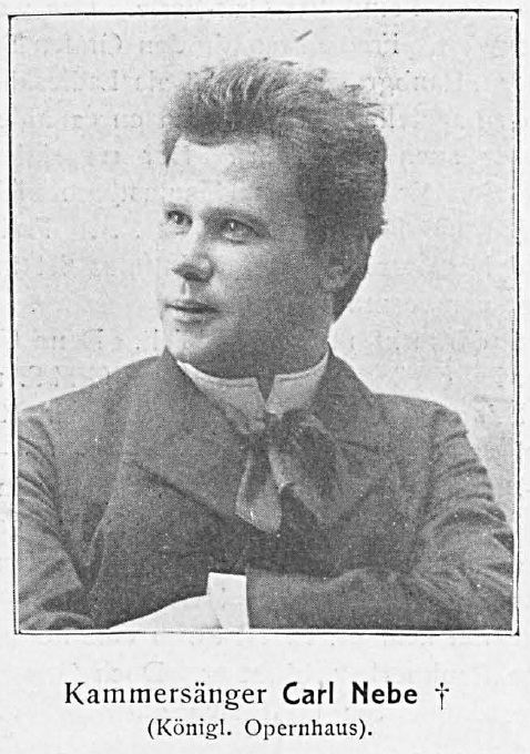 Carl Johann Eduard Nebe (1858-1908), deutscher Opernsänger in der Stimmlage Bass-Bariton.